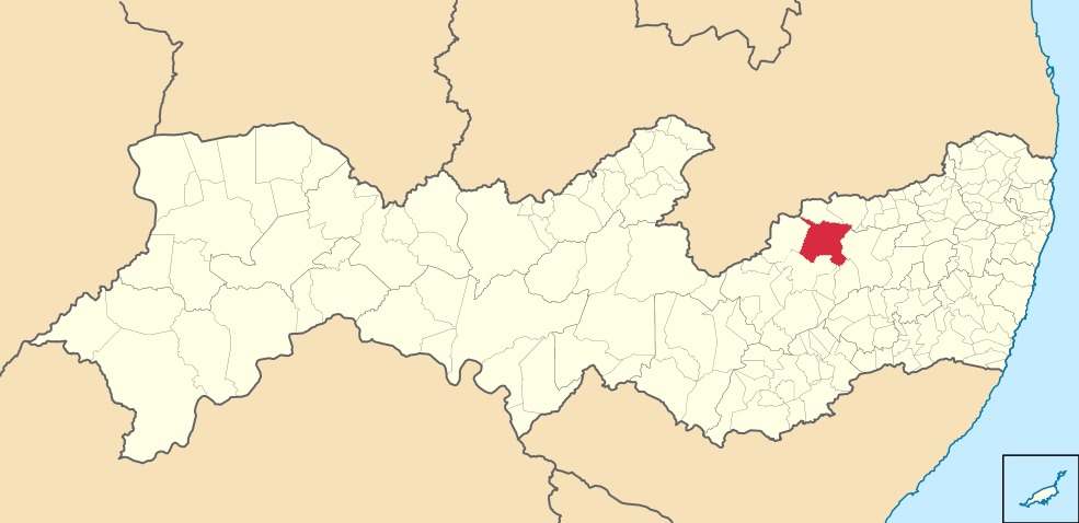 Mapa de Brejo da Madre de Deus (2)